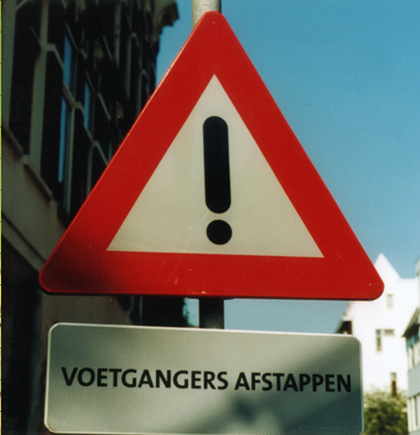 תמרור התראה - בדרך כלל סימן קריאה בתוך משולש.